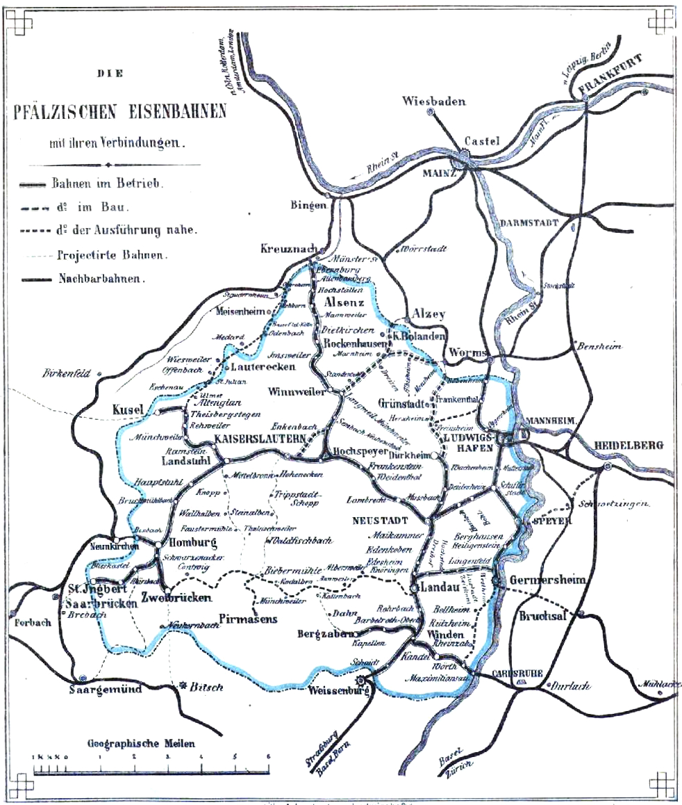 Pfälzische Eisenbahnen zum Stand 01.01.1872